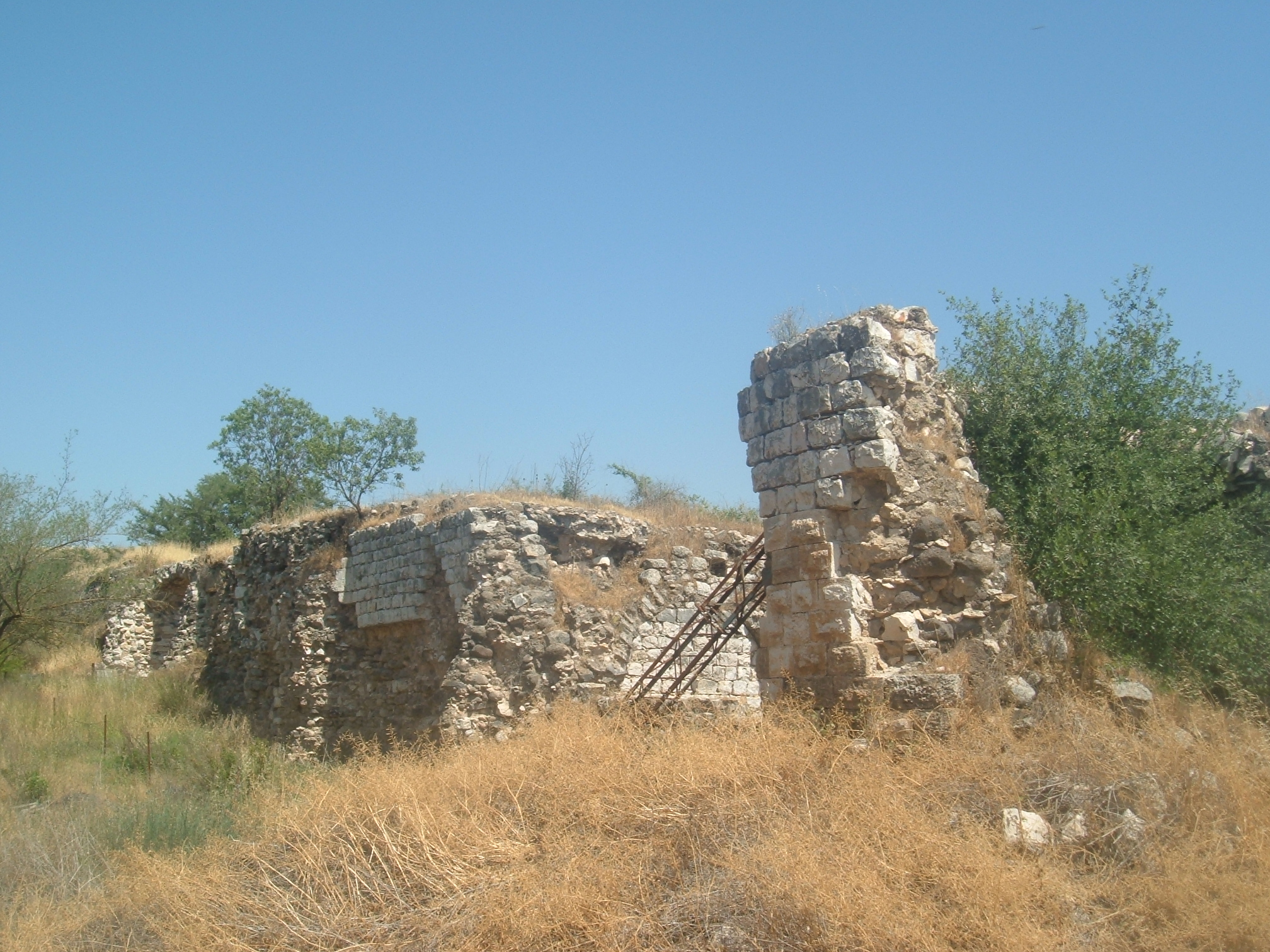 han el tujar near beyt keshet israel חנות התגרים (חאן אל תוג'ר) מול הכניסה לבית קשת, ישראל